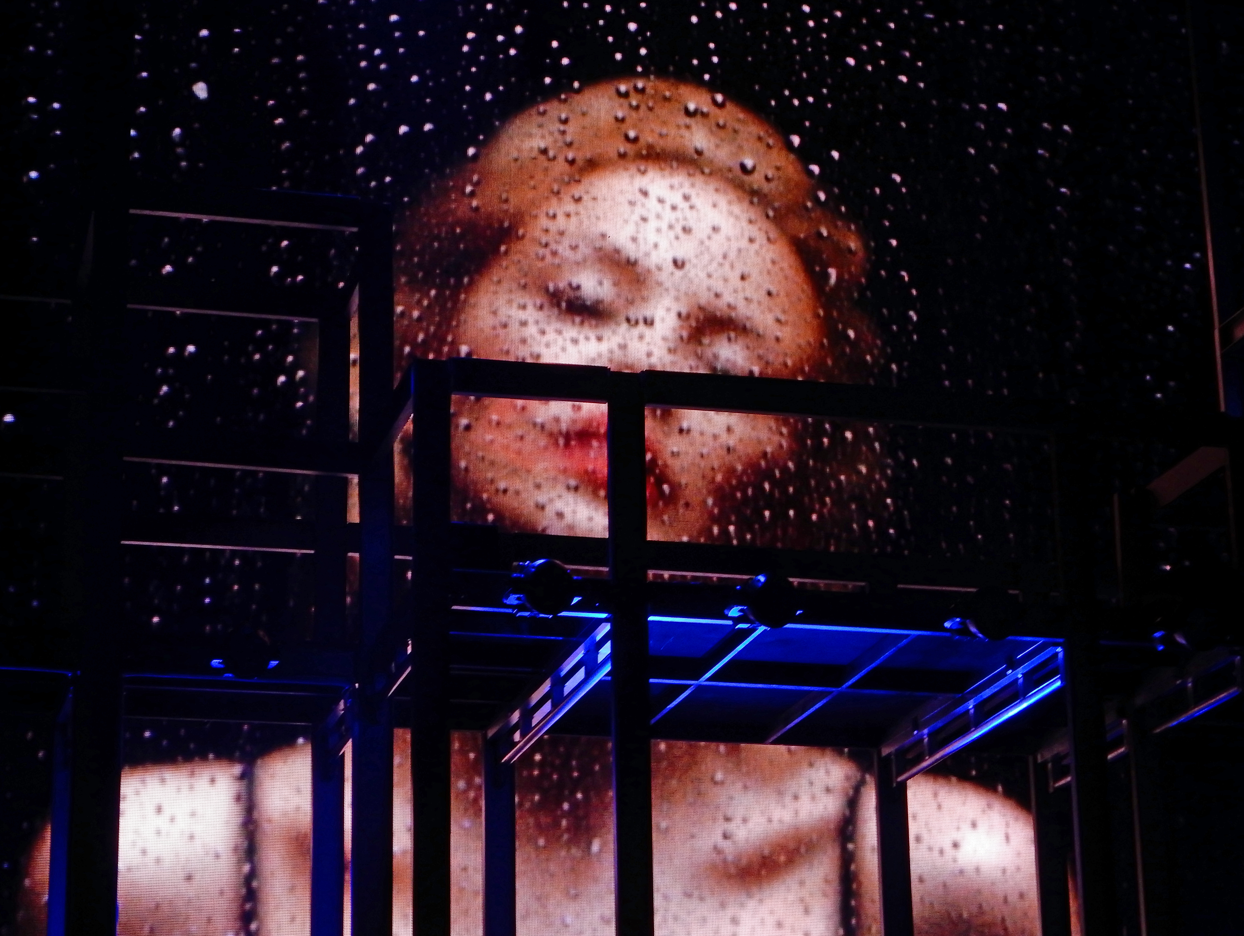 Kylie Minogue - Kiss Me Once Tour - Manchester - 26.09.14. - 002